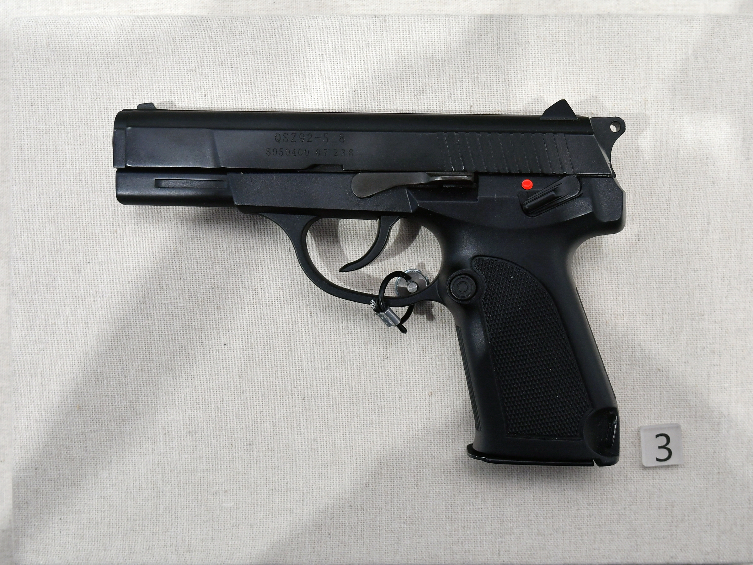 QSZ92-5.8mm手枪